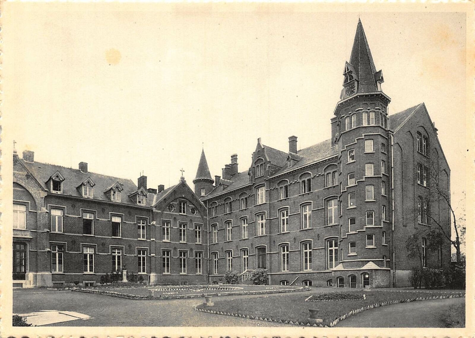 Maison mère des pères missionnaires de Scheut, aile Sud, vers 1937.